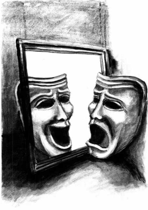 Maski - symbol Spotkań Teatralnych Zwierciadła